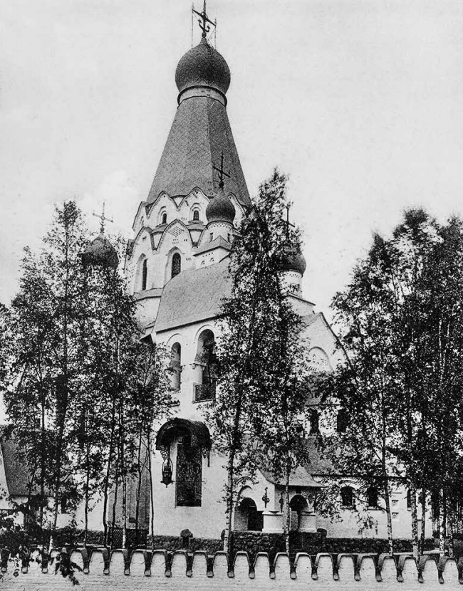 Храм Апостолов Петра и Павла, построенный при Шлиссельбургском пороховом заводе.